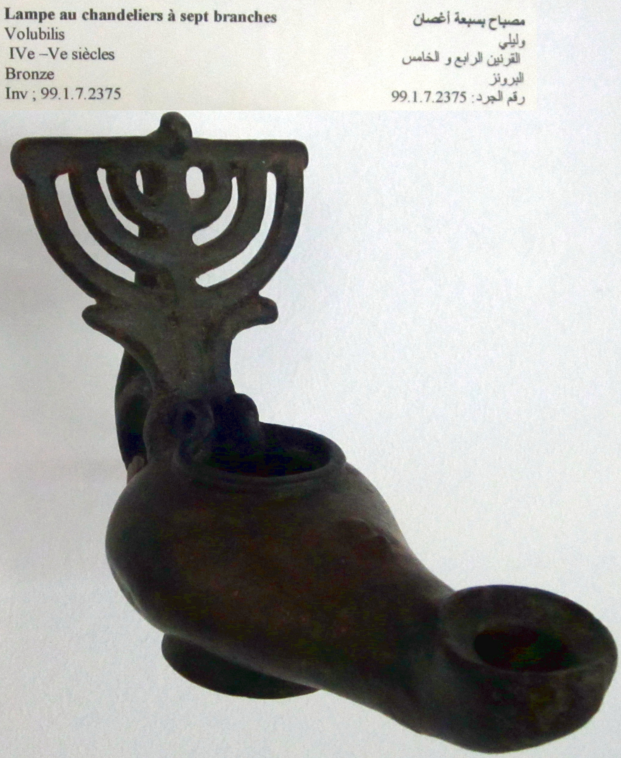 Le Musée archéologique de Rabat. Экспонат археологического музея Рабата. Лампада с семисвечником (IV-V вв., бронза). UNESCO